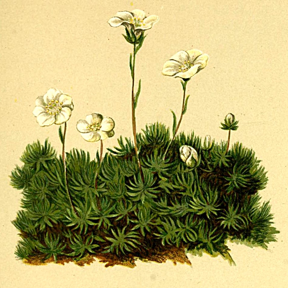 Saxifraga burseriana (Saxifraga aretioides)